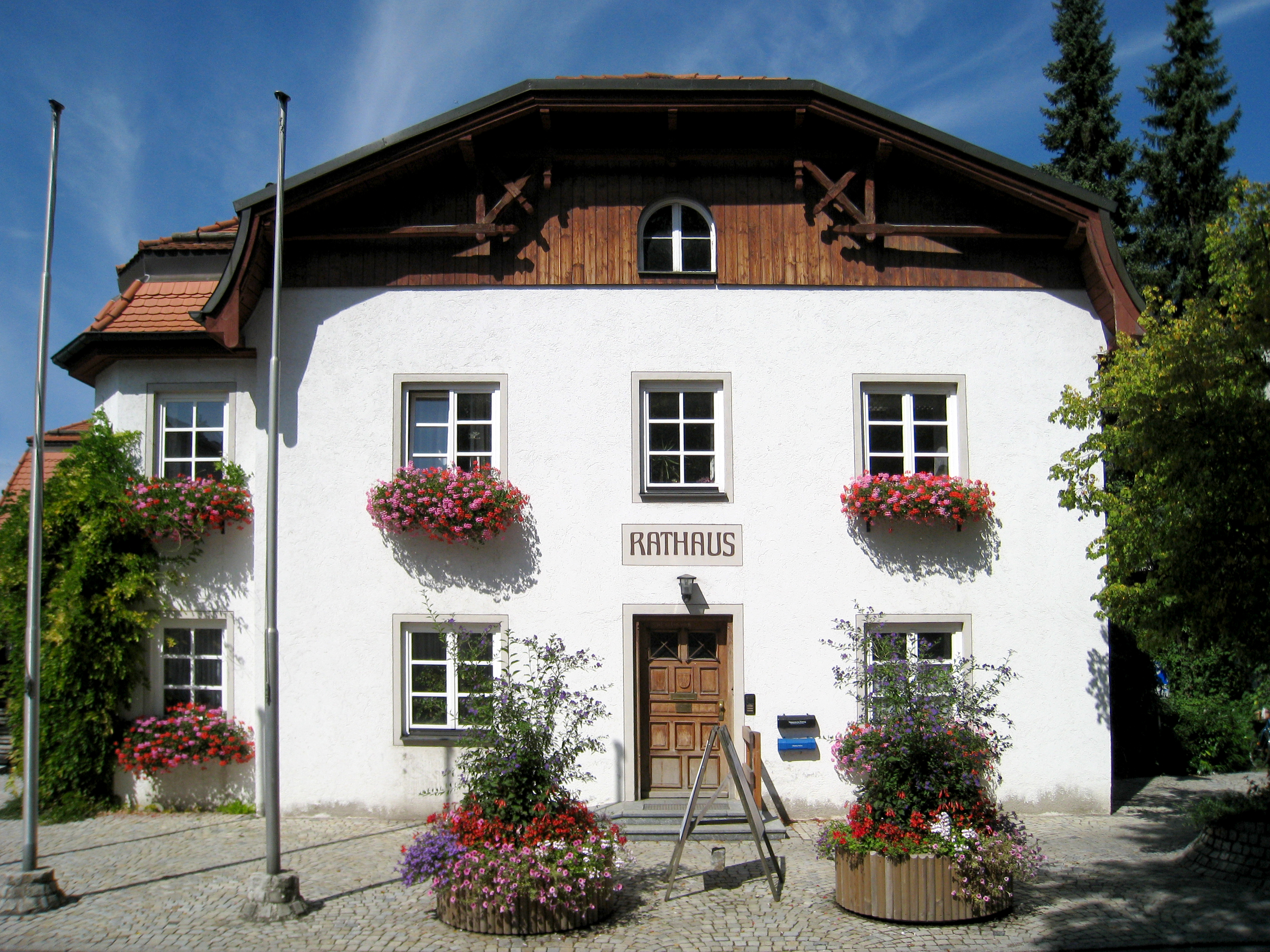 Das alte Rathaus von Seefeld.